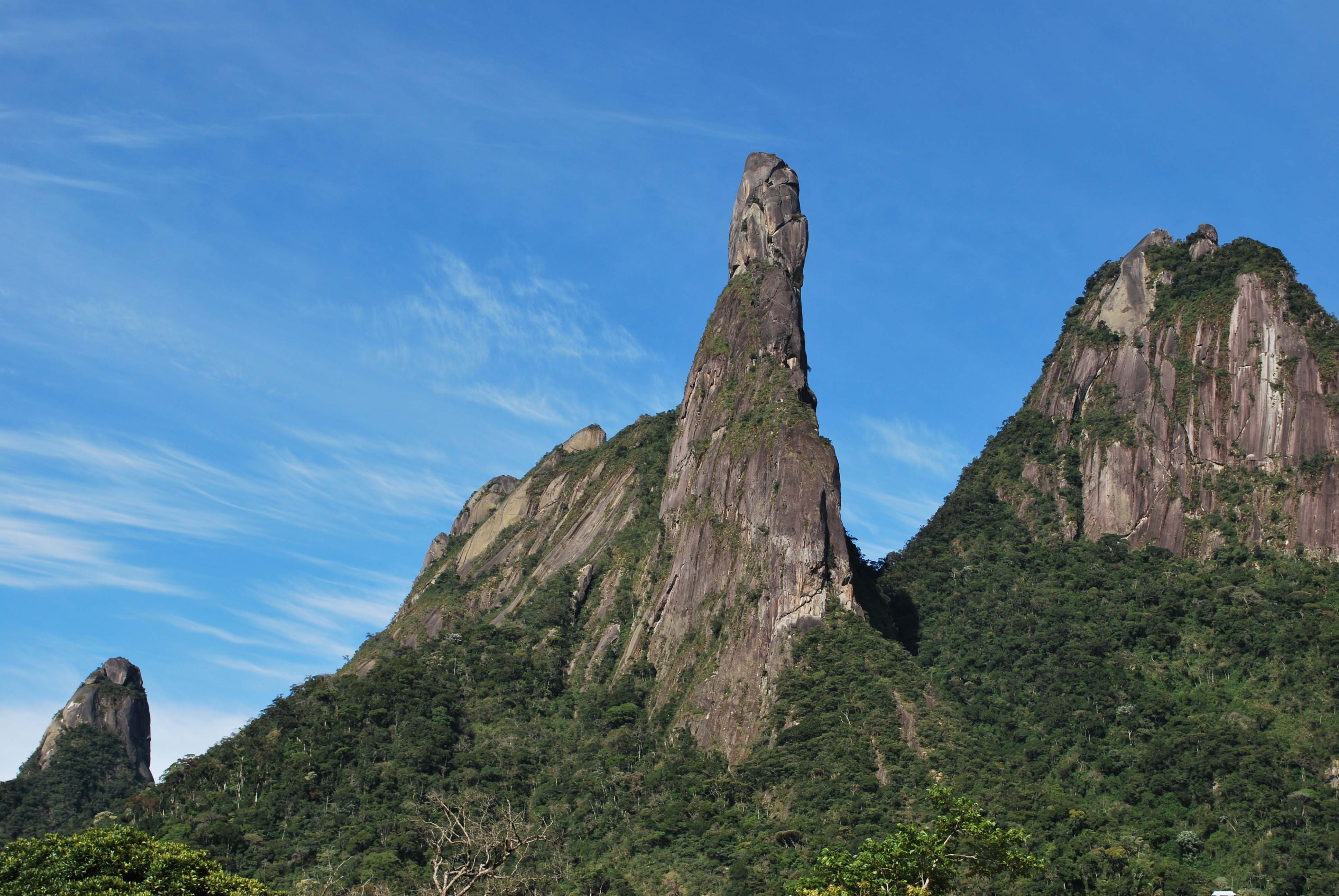 Teresópolis